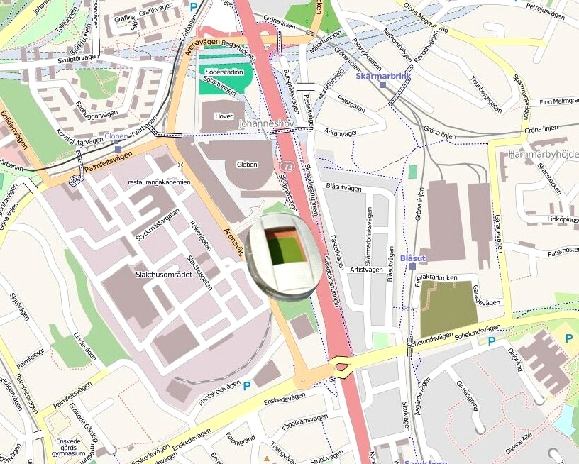 Nya Stockholmsarenans placering i Globenområdet This map may be incomplete, and may contain errors. Don't rely solely on it for navigation.